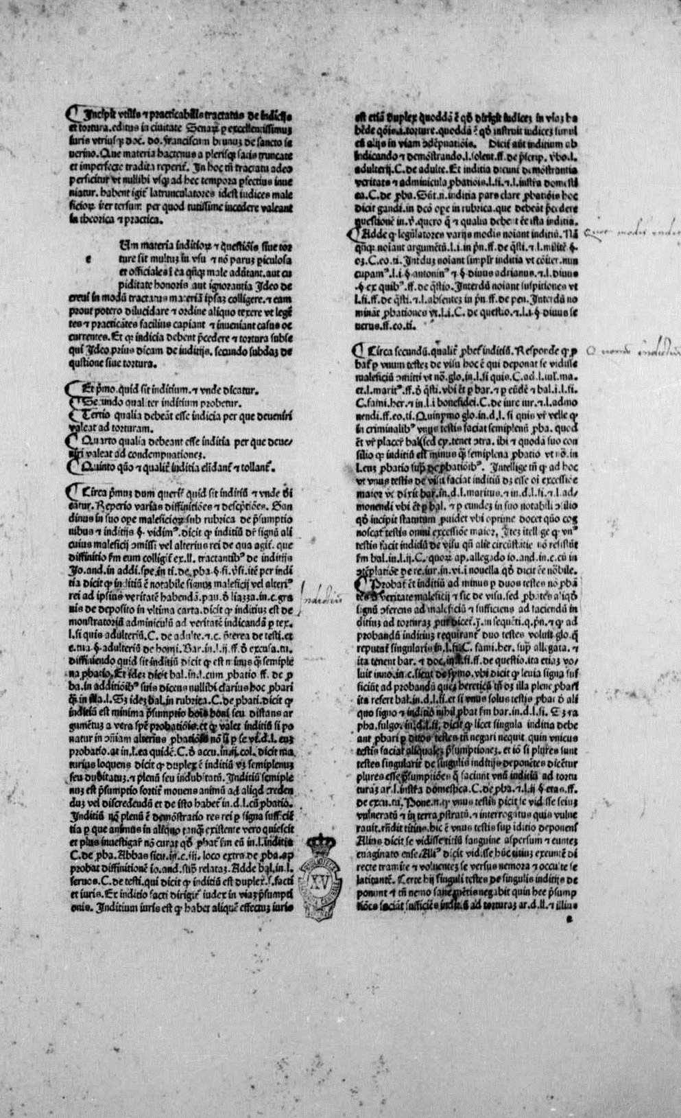 Carta a1r